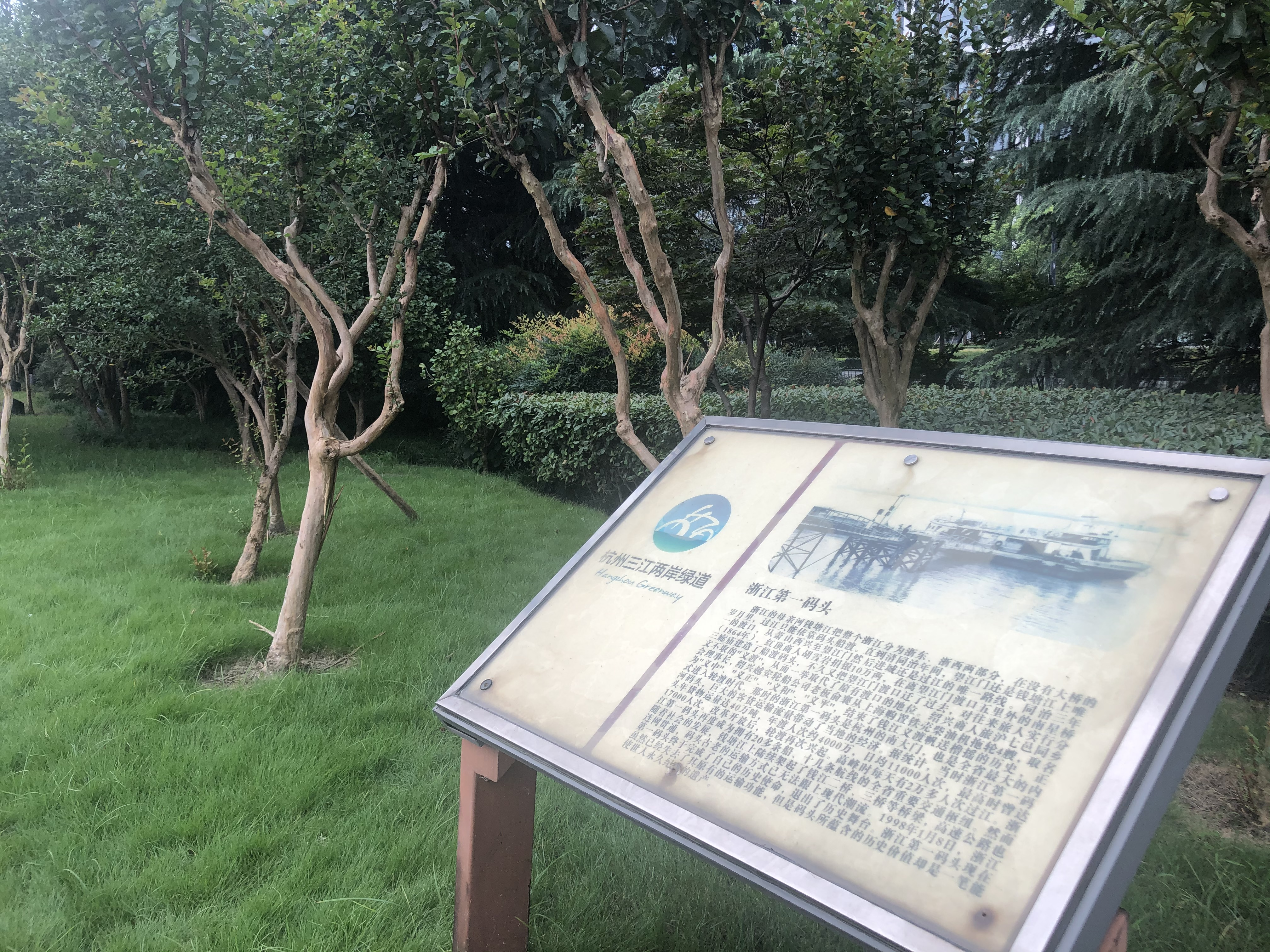 浙江第一码头介绍